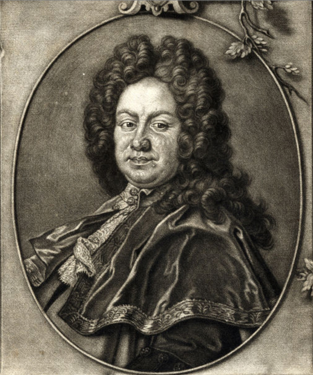 Johann David Köhler (* 18. Januar 1684; † 10. März 1755), deutscher Historiker. Porträt aus einem 1720 erschienenen Kartenwerk.